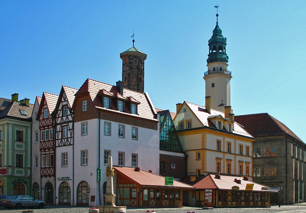 Lubań, rynek.